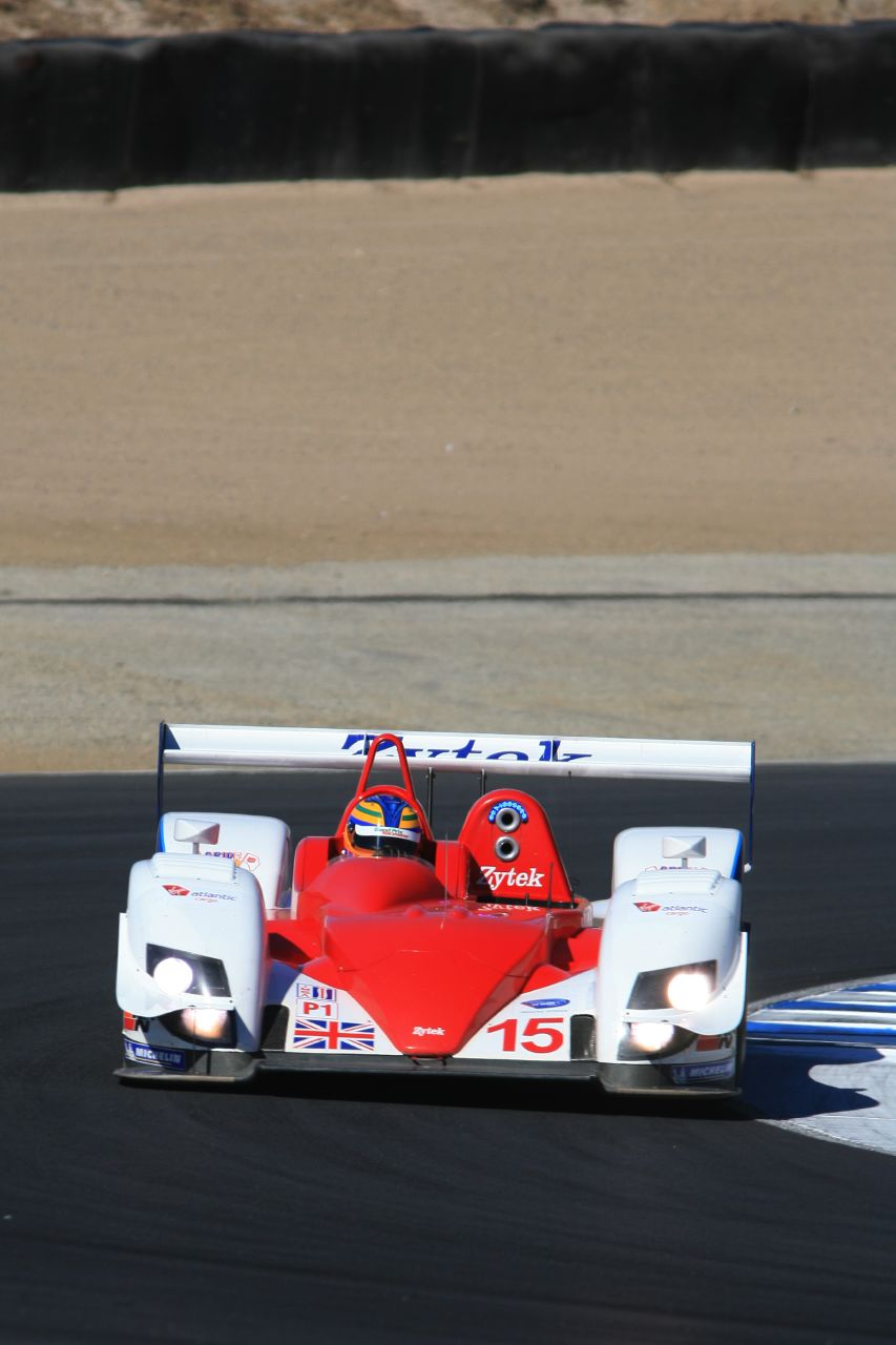 Zytek's Engineering's Zytek 06S